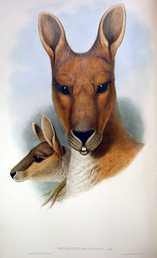 Macropus antilopinus